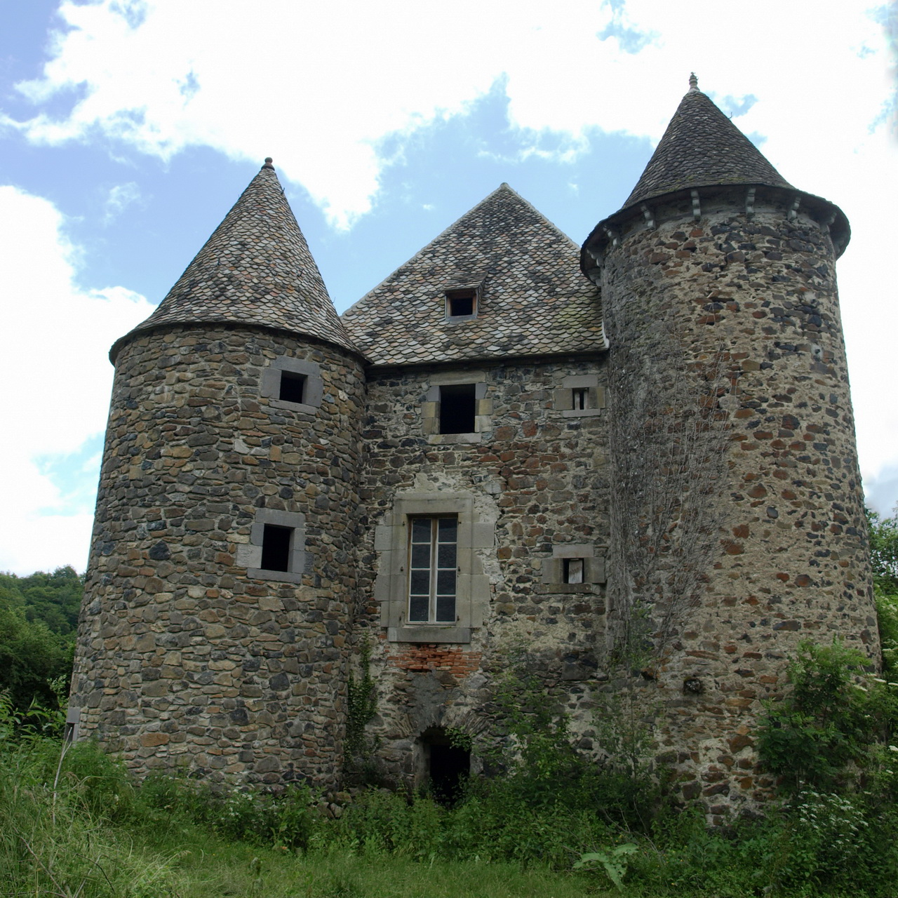 Château de Celles sur la commune de Carlat dans le Cantal.